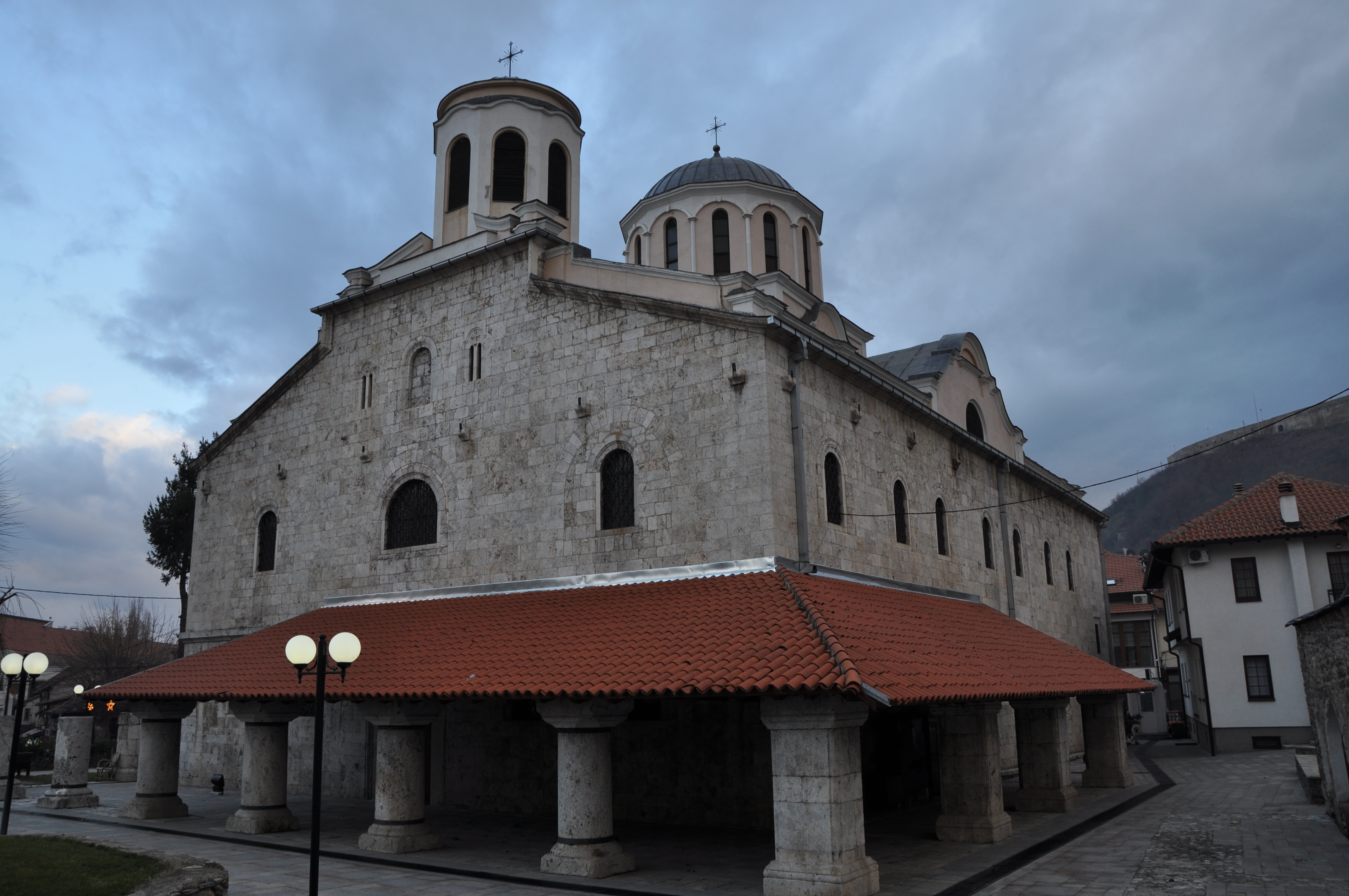 Kisha e Shën Gjergjit (Sinodale)